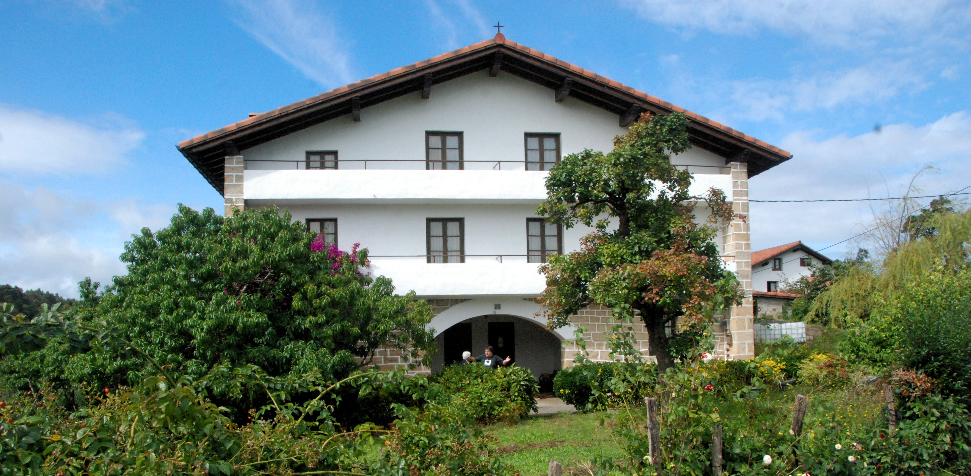 Fradu baserria. Demiku, Bermeo.